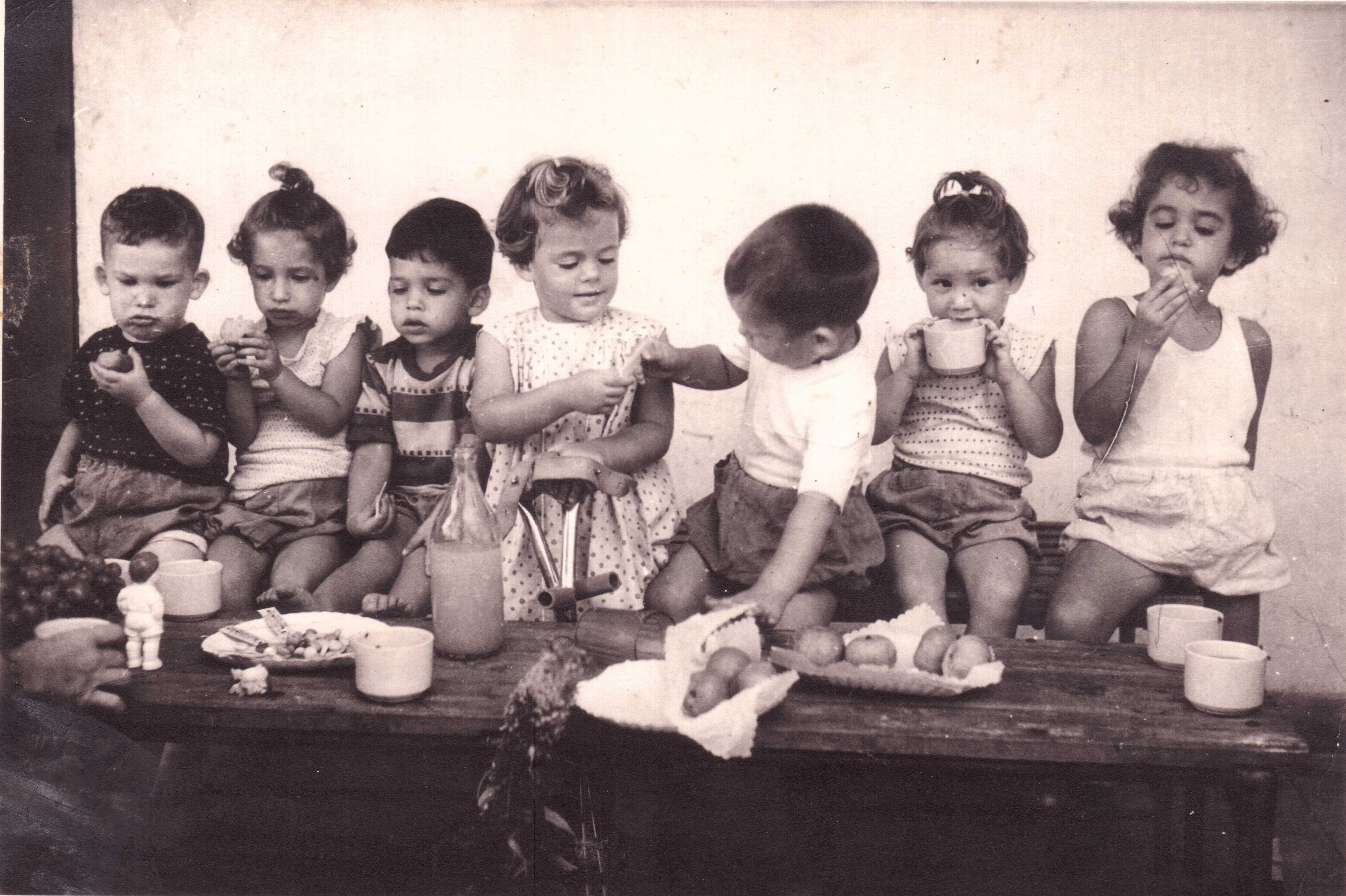 ילדי קבוץ אילון, גנון הינדה, 1956